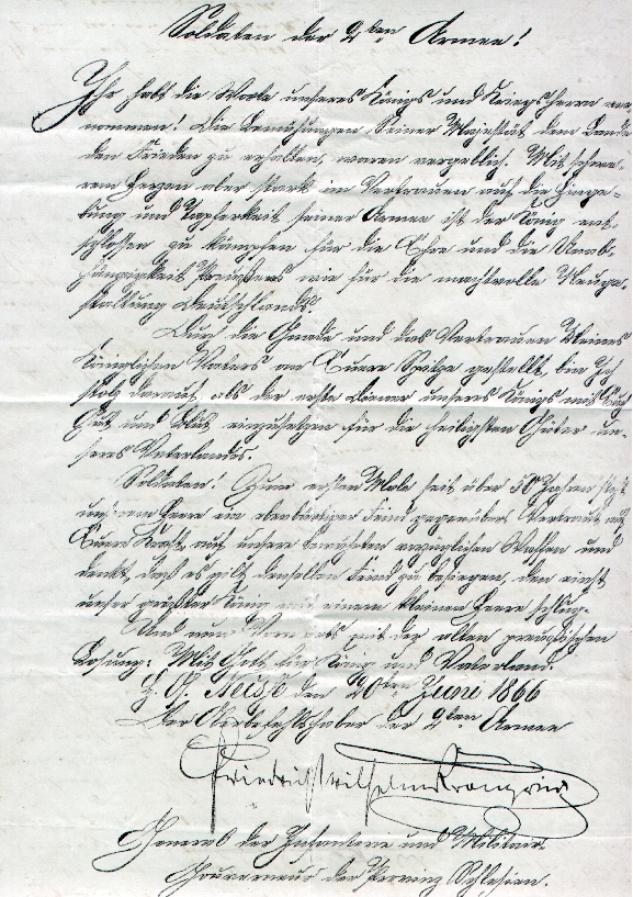 Preußischer Armeebefehl vom 20. Juni 1866. Er trägt die Unterschrift Friedrich Wilhelm Kronprinz, des späteren deutschen Kaisers Friedrich III. Auf der Rückseite dieses Dokuments hat der Kriegsteilnehmer Ferdinand Henry seinen 13. der Briefe aus dem Deutschen Krieg geschrieben. Herkunft: Familienbesitz der Nachfahren von Ferdinand Henry.